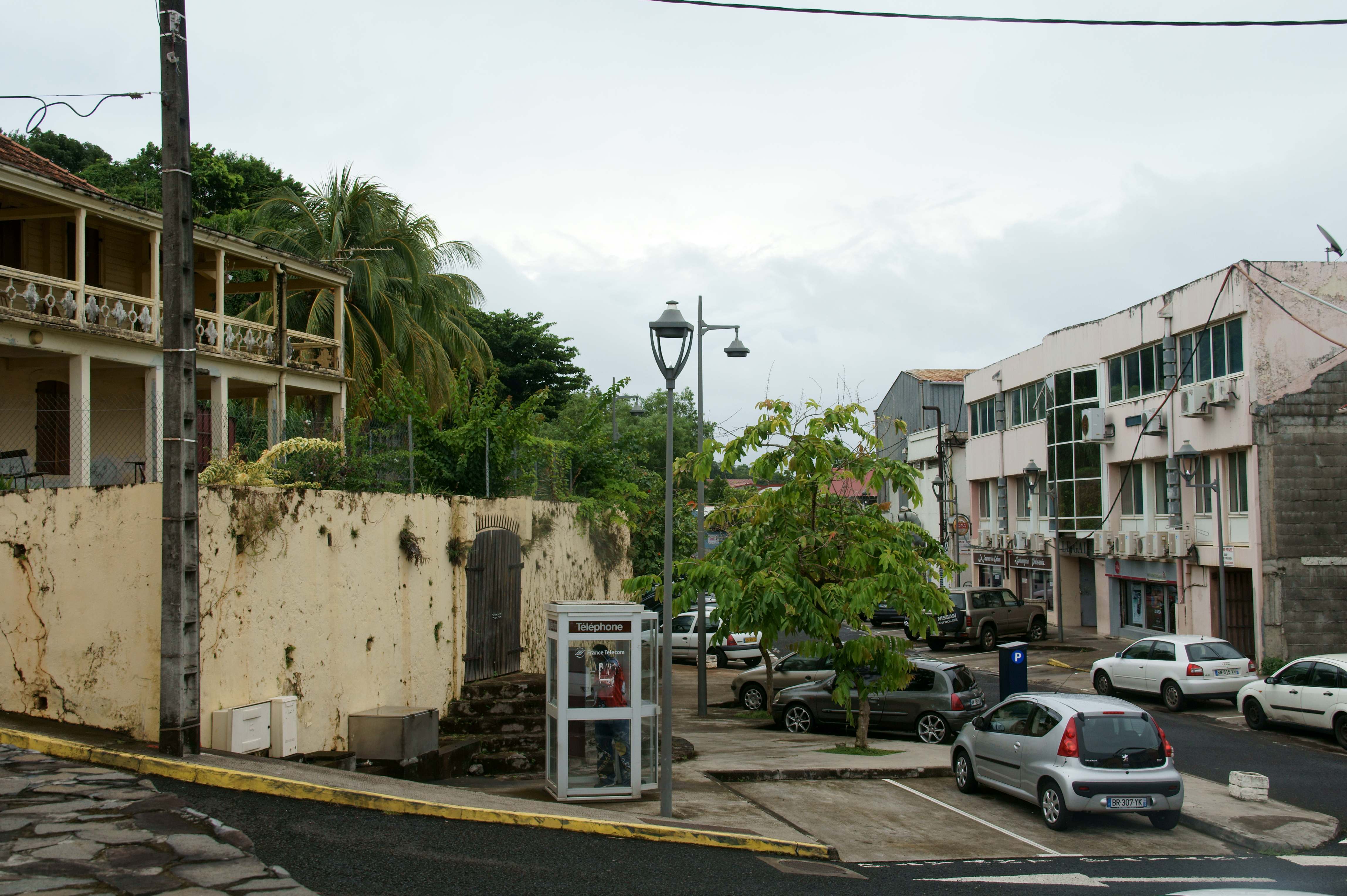 Détail de l'urbanisme de la commune